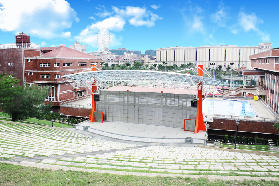 義守大學校內戶外劇場。